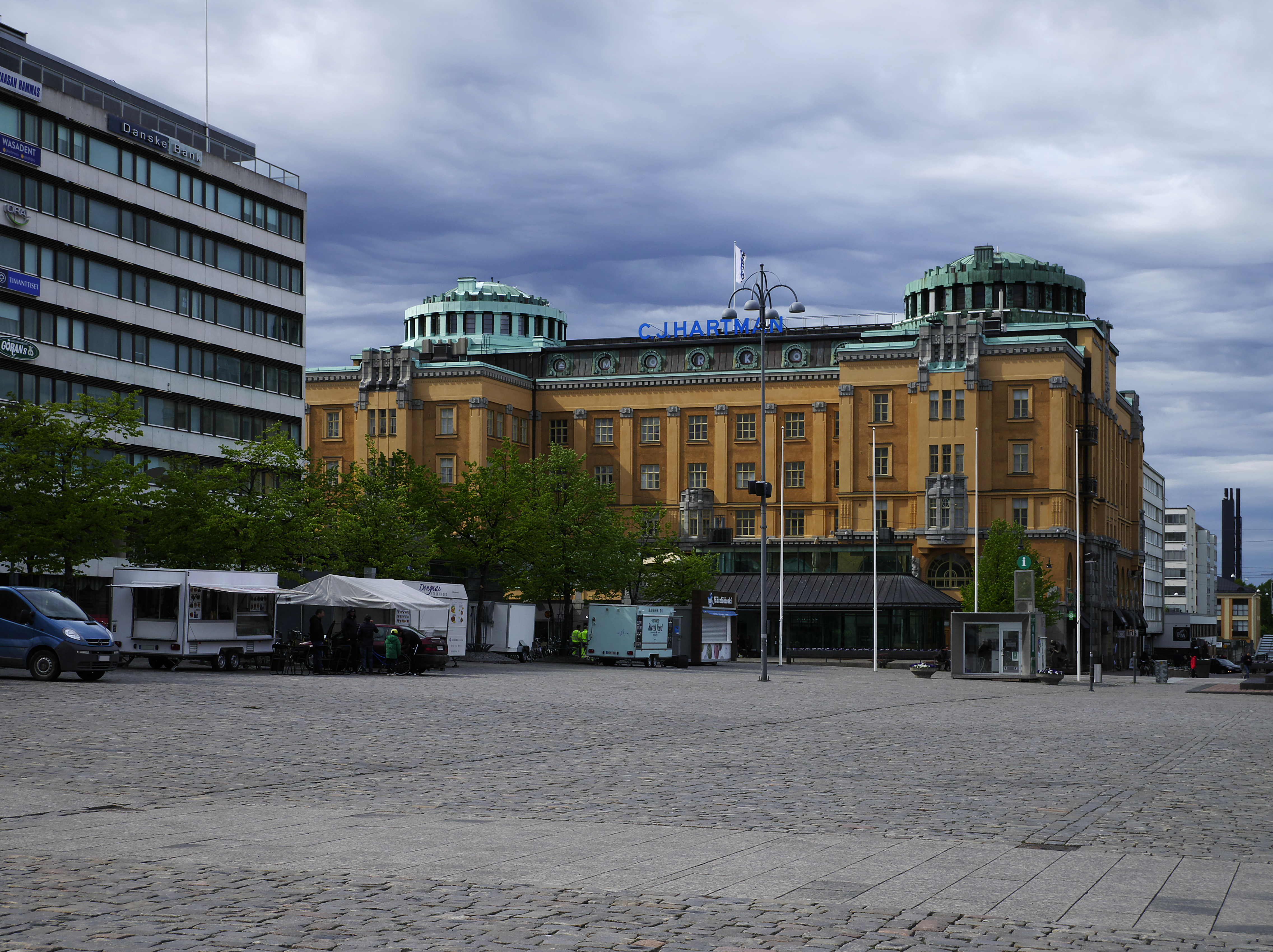 Hartmanin talo Vaasan kauppatorin laidalla. Arkkitehti Kauno S. Kallion suunnittelema rakennus on valmistunut 1913.